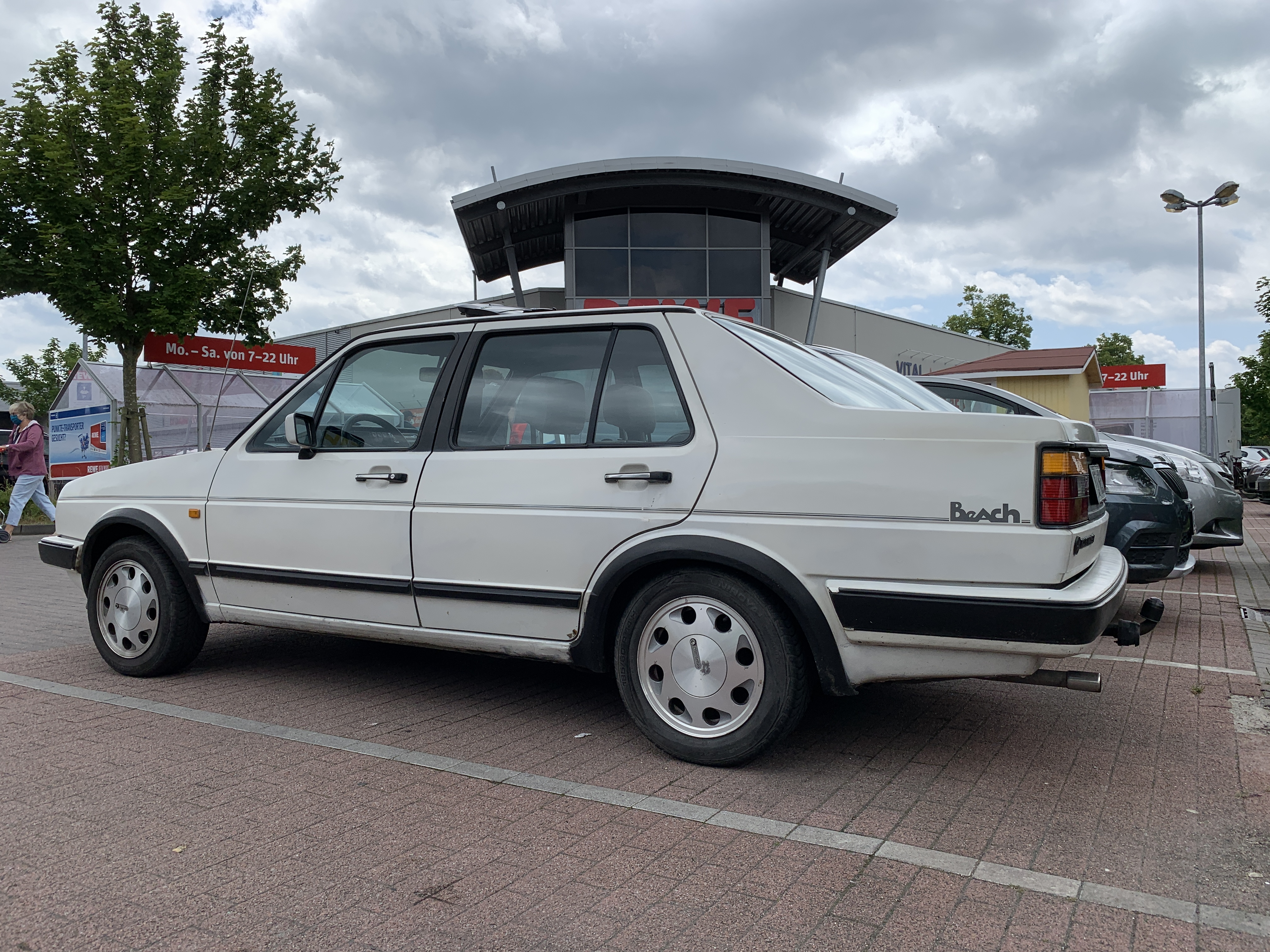 VW Jetta II Beach Heckansicht